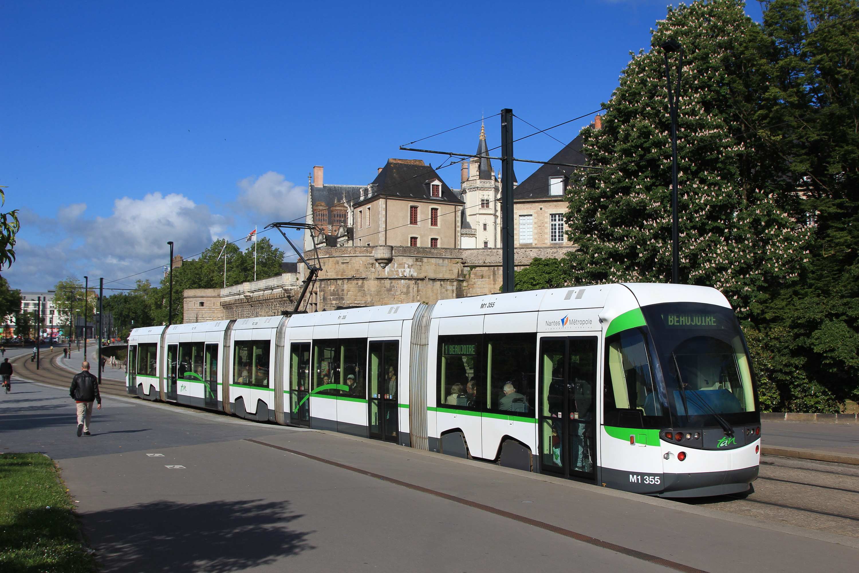 Rame Incentro du tramway nantais devant le château des ducs de Bretagne.